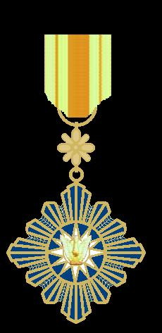 Eigen tekenwerk